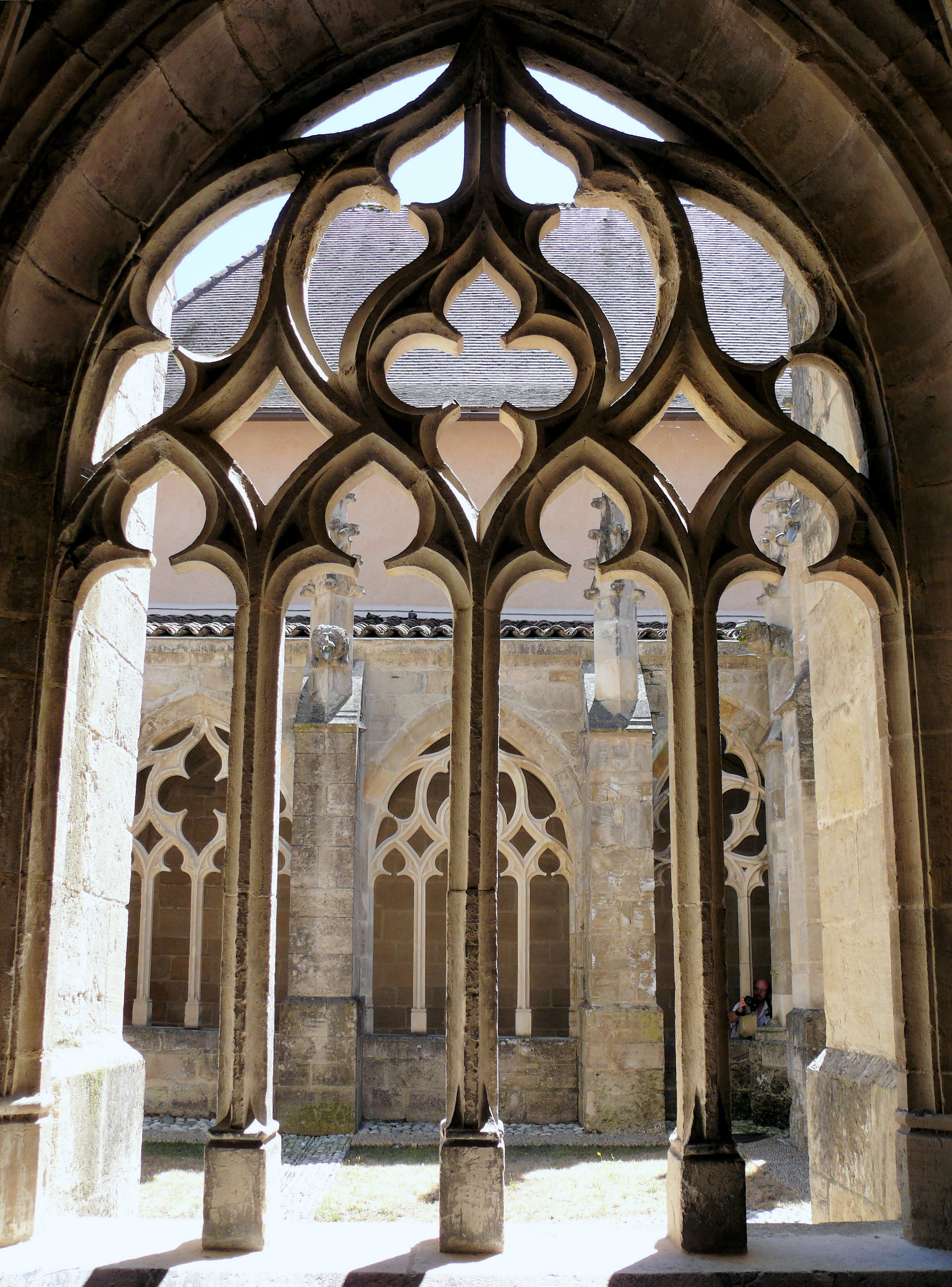 Villefranche-de-Rouergue - Chartreuse Saint-Sauveur - Petit cloître